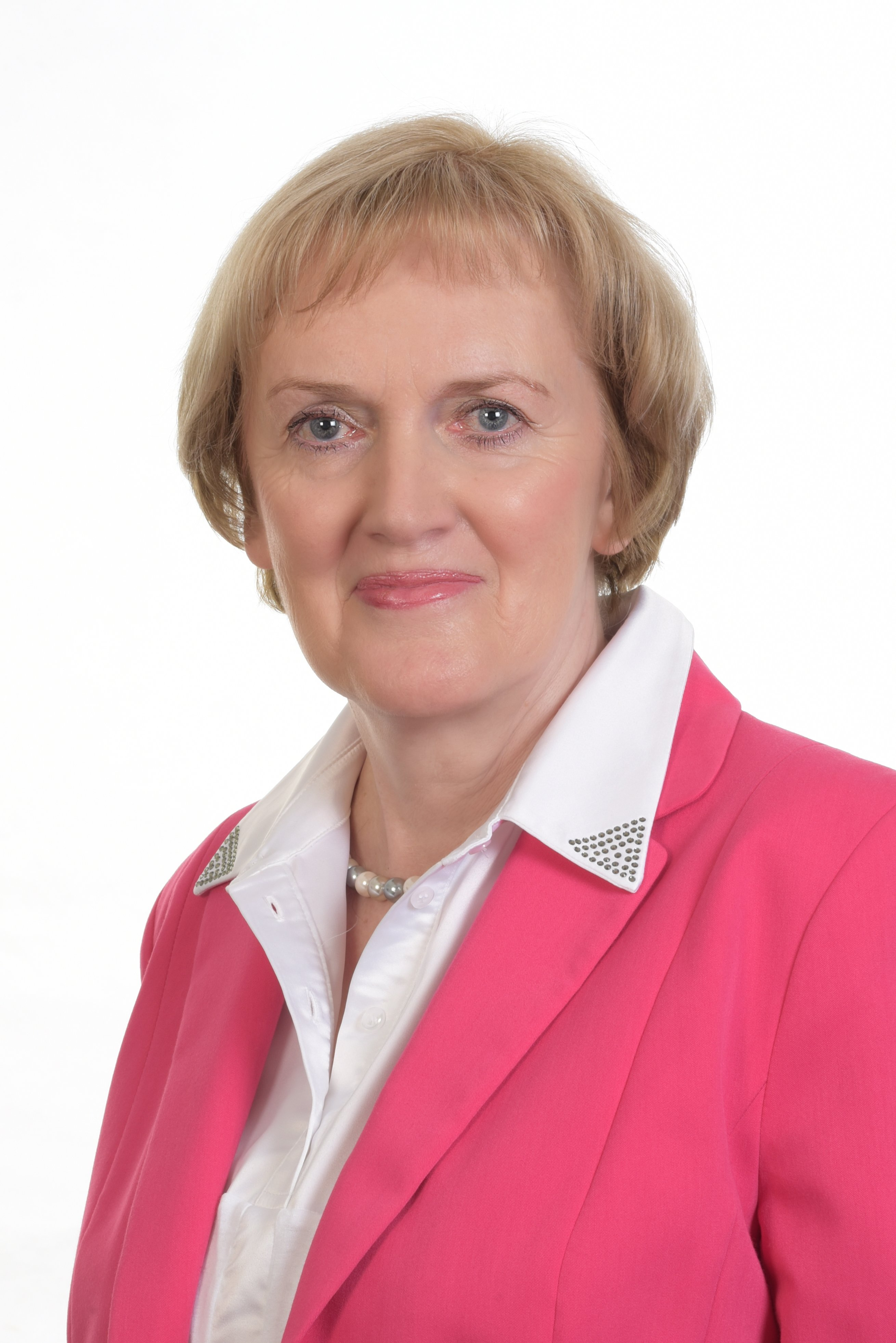 Pressefoto